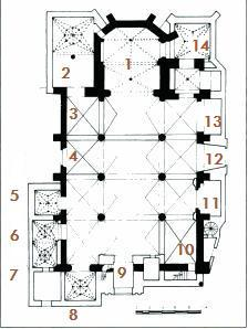 Planta de la S.I. Concatedral Metropolitana de Mérida